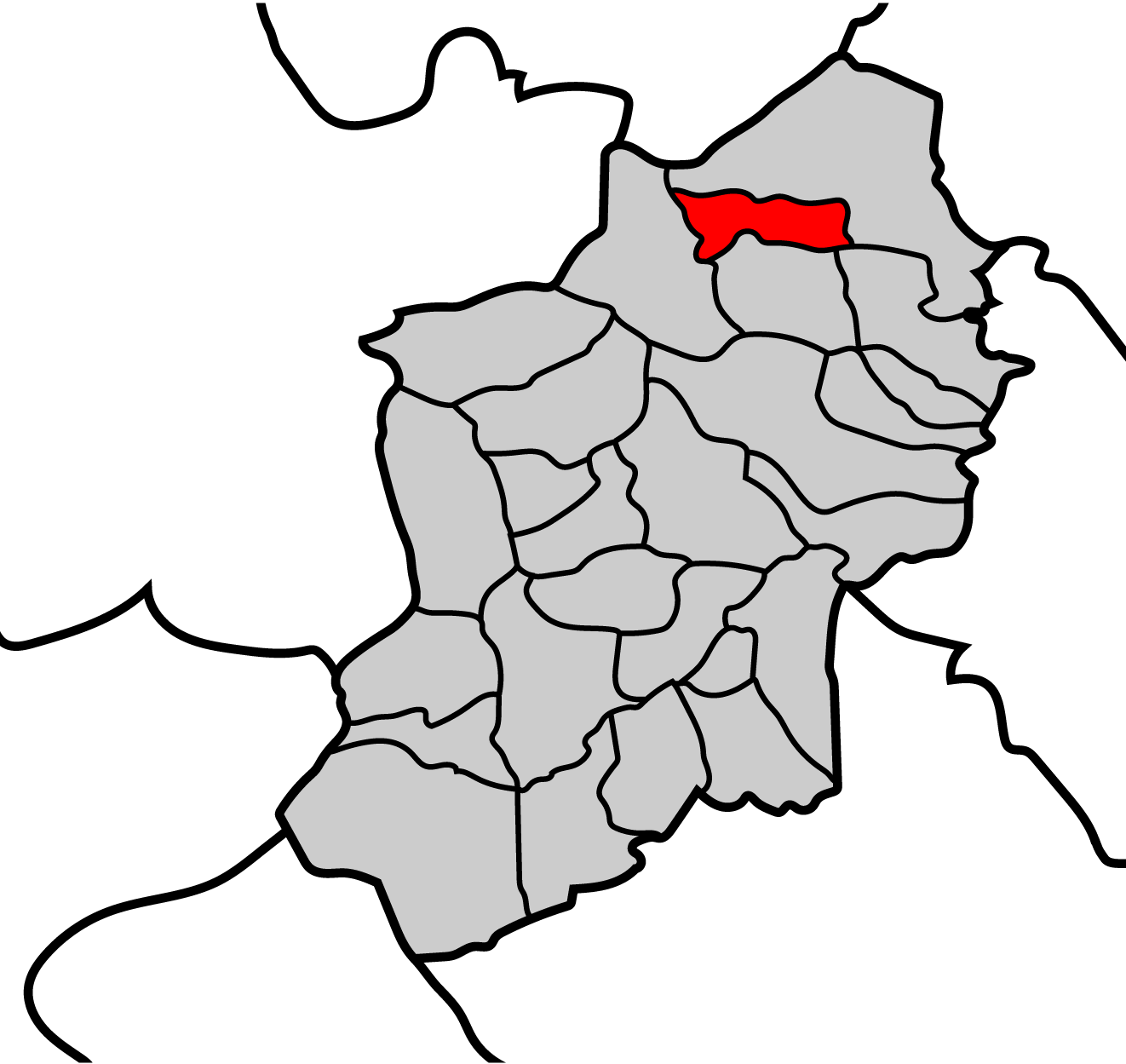 Mapa de la parroquia de Sevane ayuntamiento de Becerreá